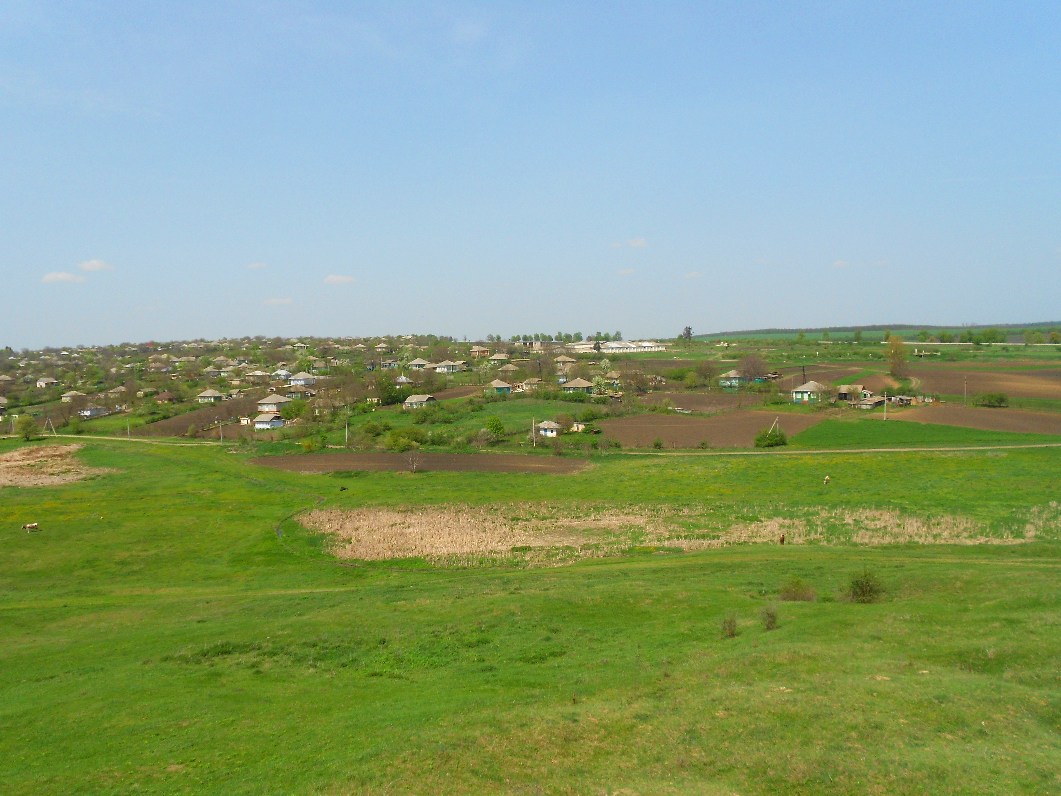 Târnova, Dondușeni